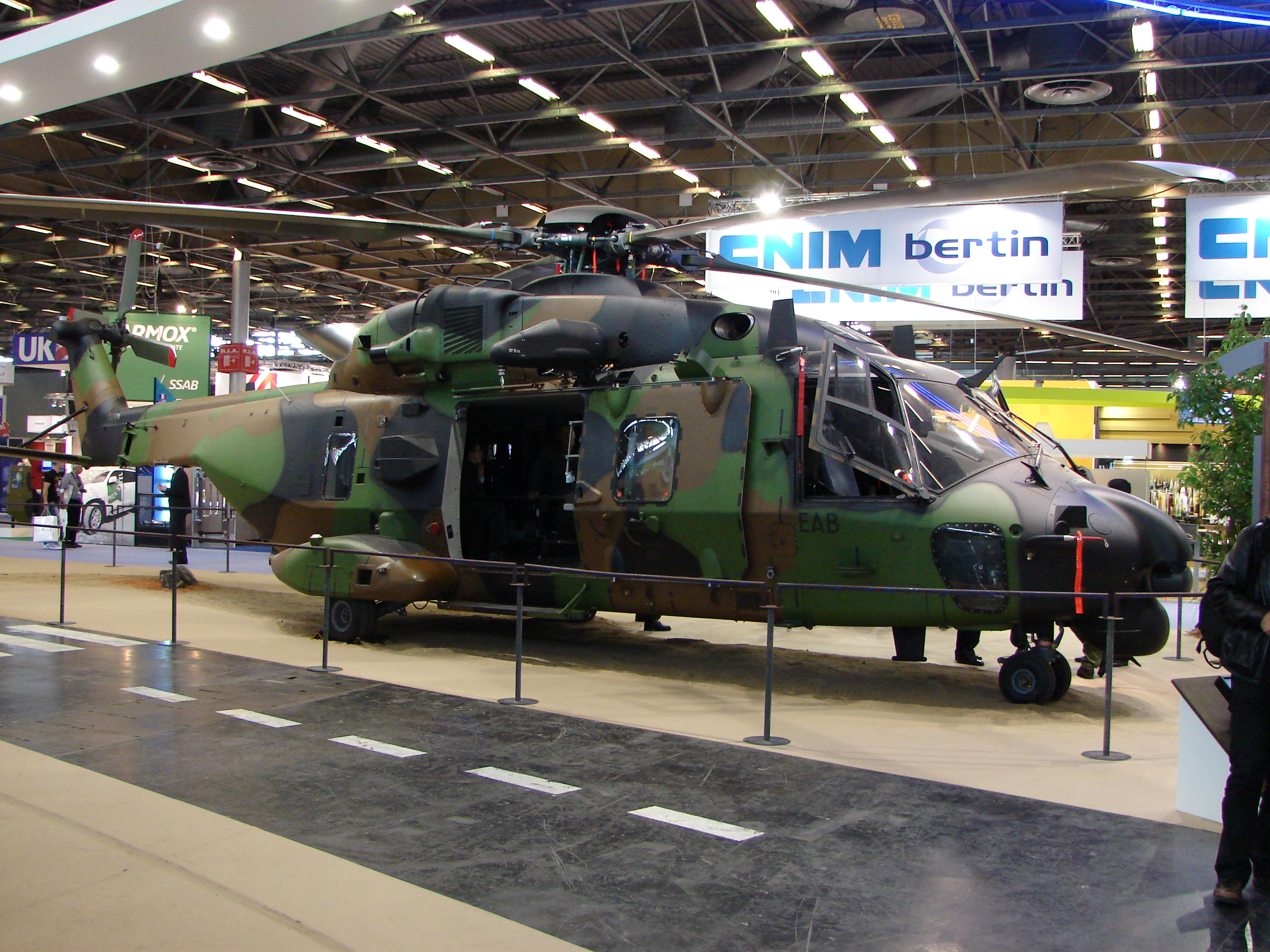 NHIndustries NH90 à Eurosatory 2012